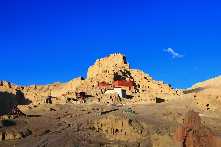 西藏古格遗址